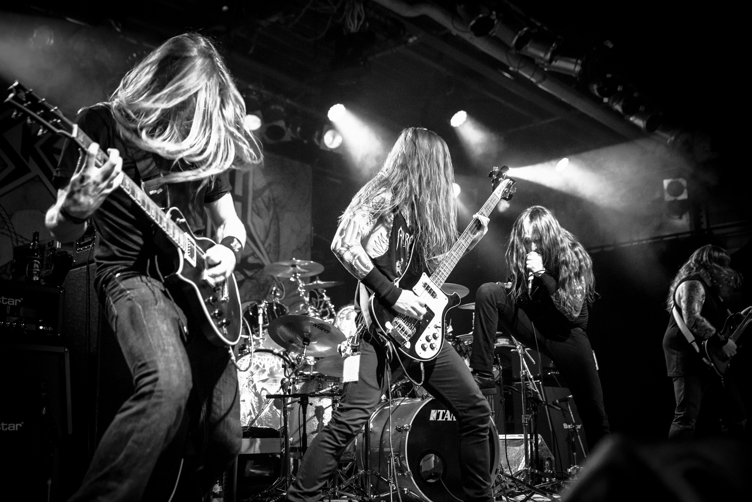 de